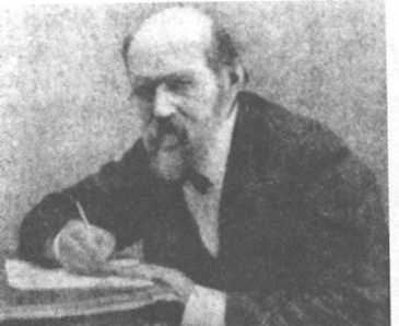 Барсов Ельпидифор Васильевич